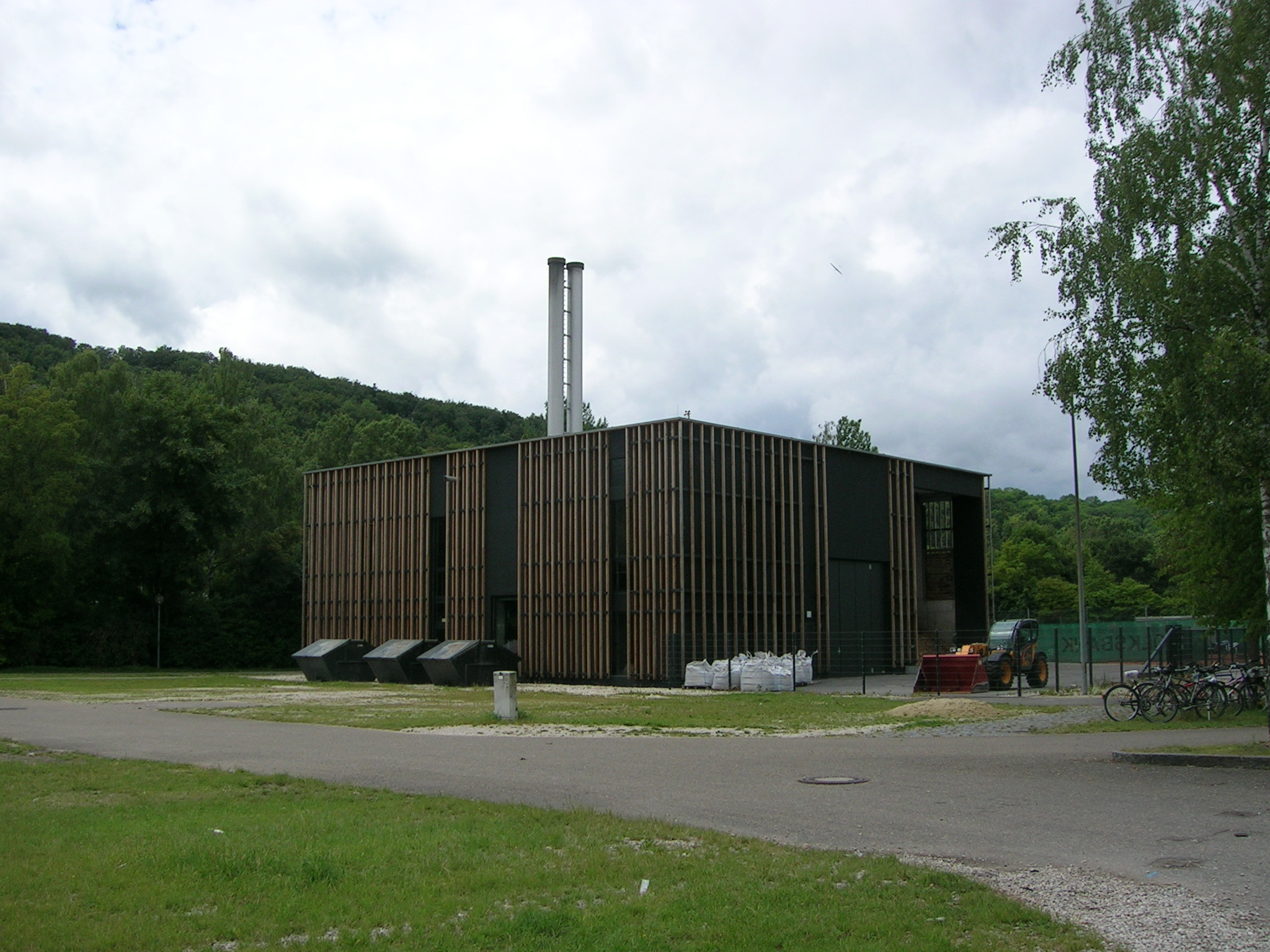 Biomasseheizwerk Schottenau Eichstätt.